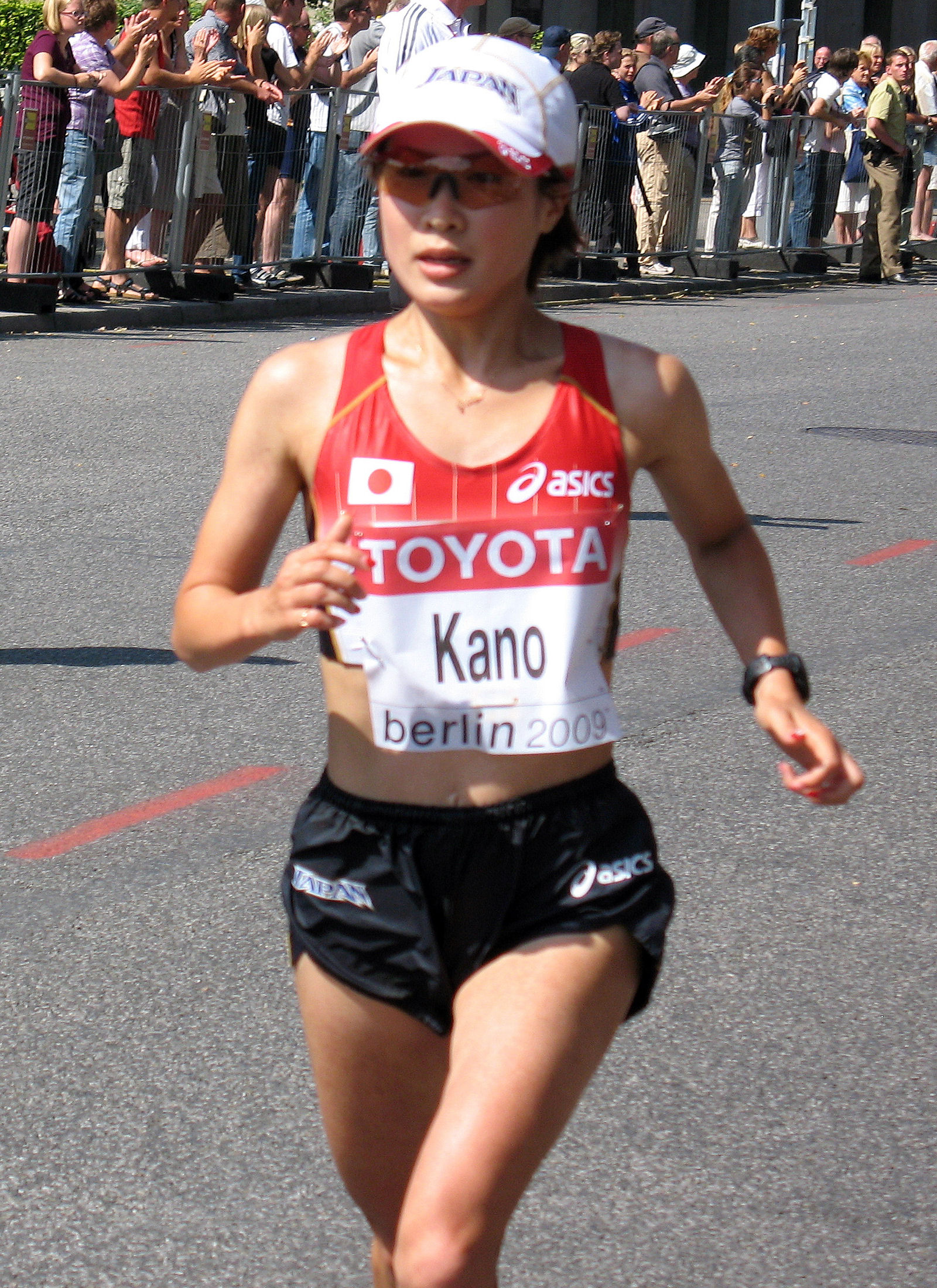 ベルリンでの加納由理（2009年8月23日）